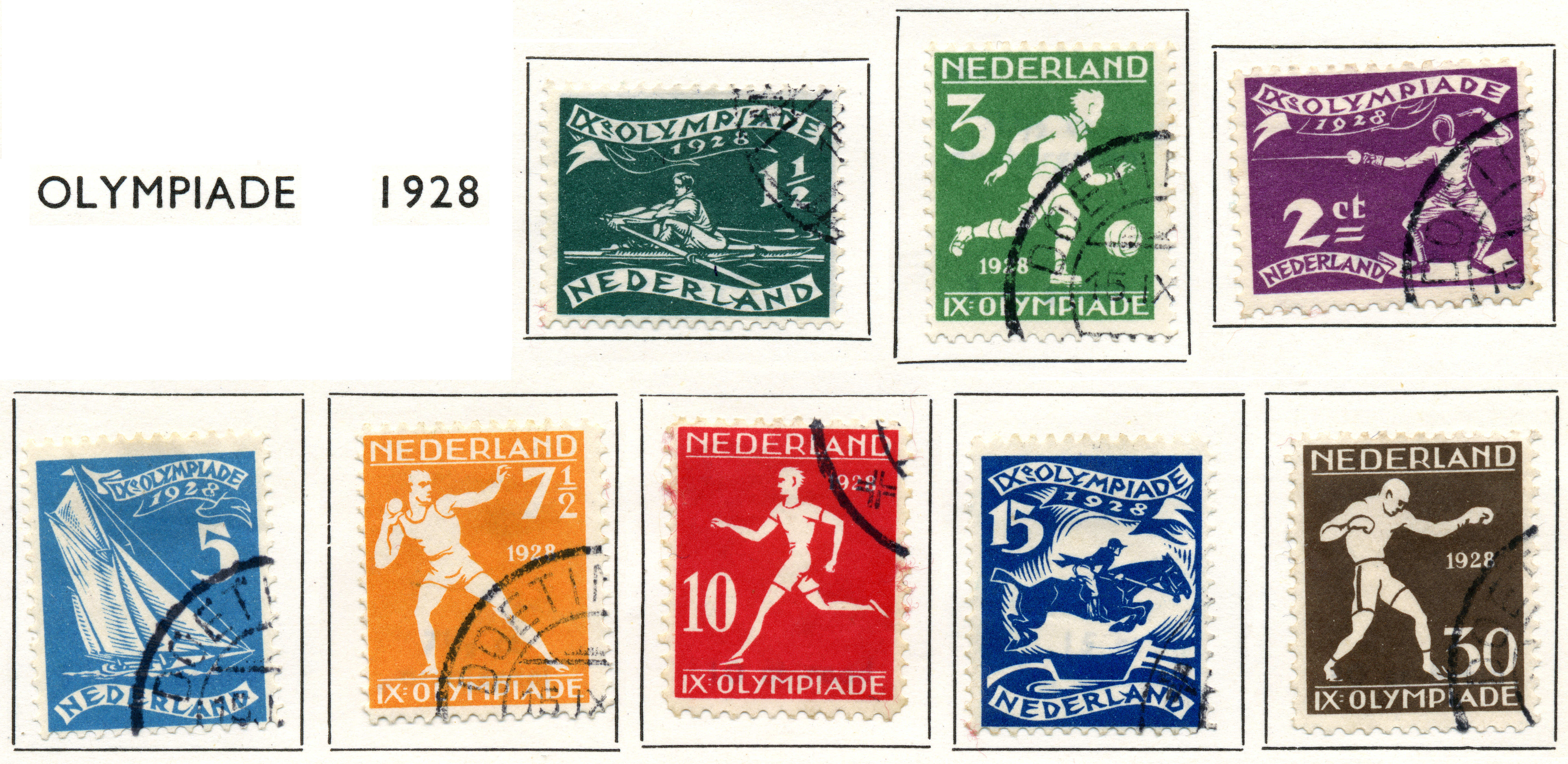 Olympiade-zegels (1928). NVPH nr 212-219. Onwerpers Fokko Mees zegels van 1½, 2, 5 & 15 ct en L.O. Wenckebach zegels van 3, 7½, 10 & 30 ct